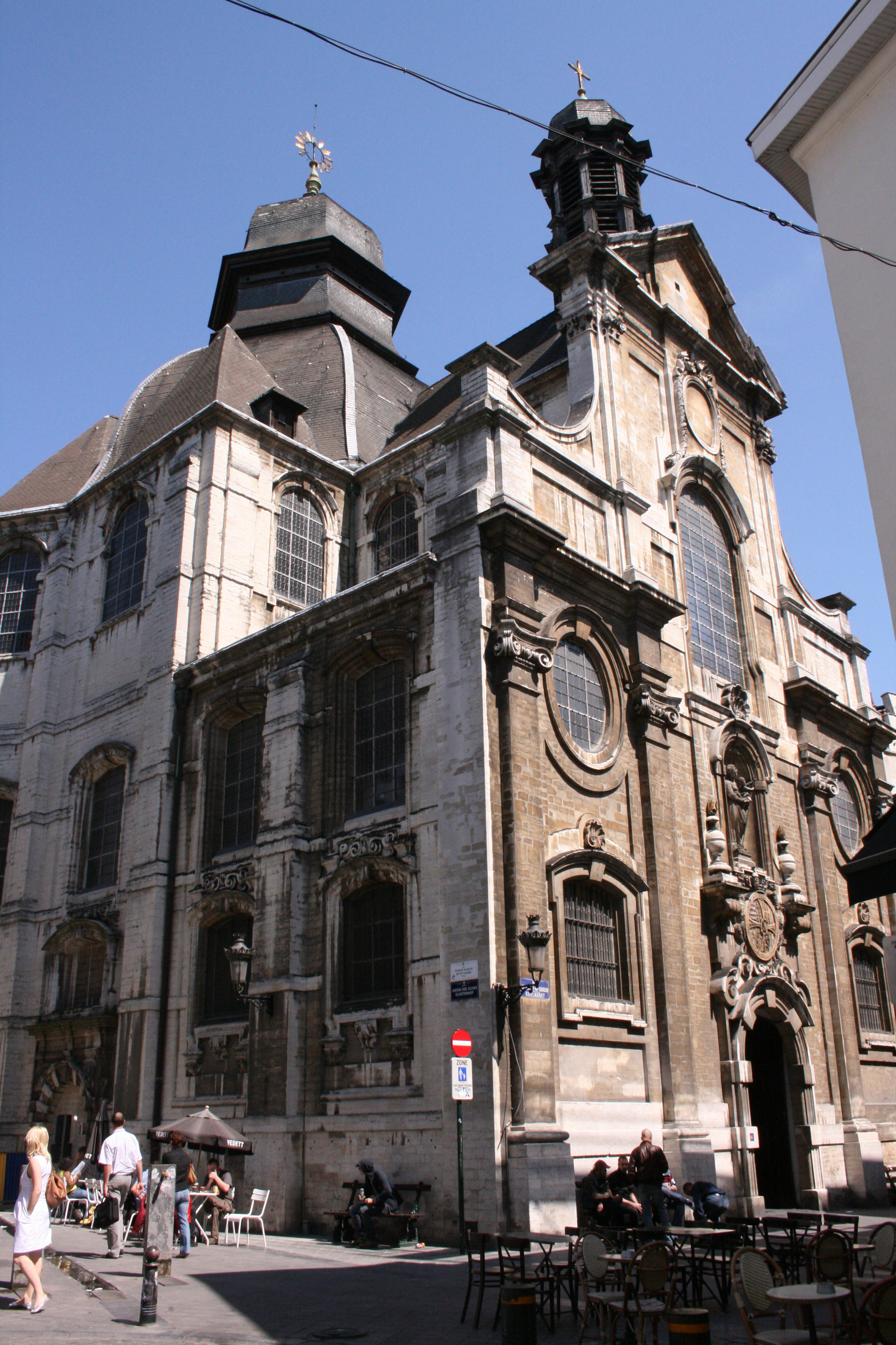 Eglise notre-Dame du Bon Secours, rue Marché au Charbon, Bruxelles (Belgique). Baroque flamand. Architecte Jean Cortvrindt